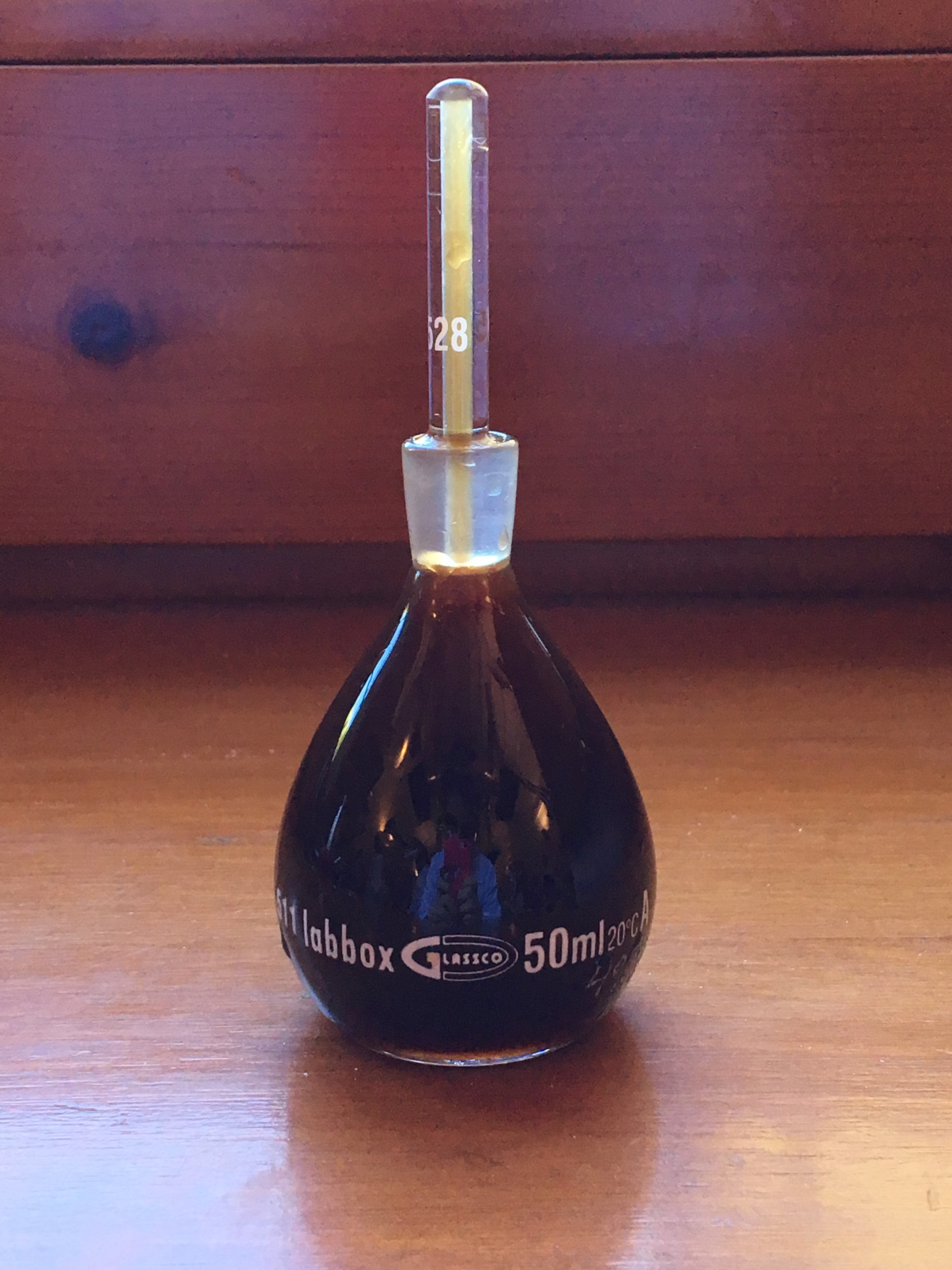 El picnòmetre s'utilitza per mesurar les diferents densitats dels líquids.